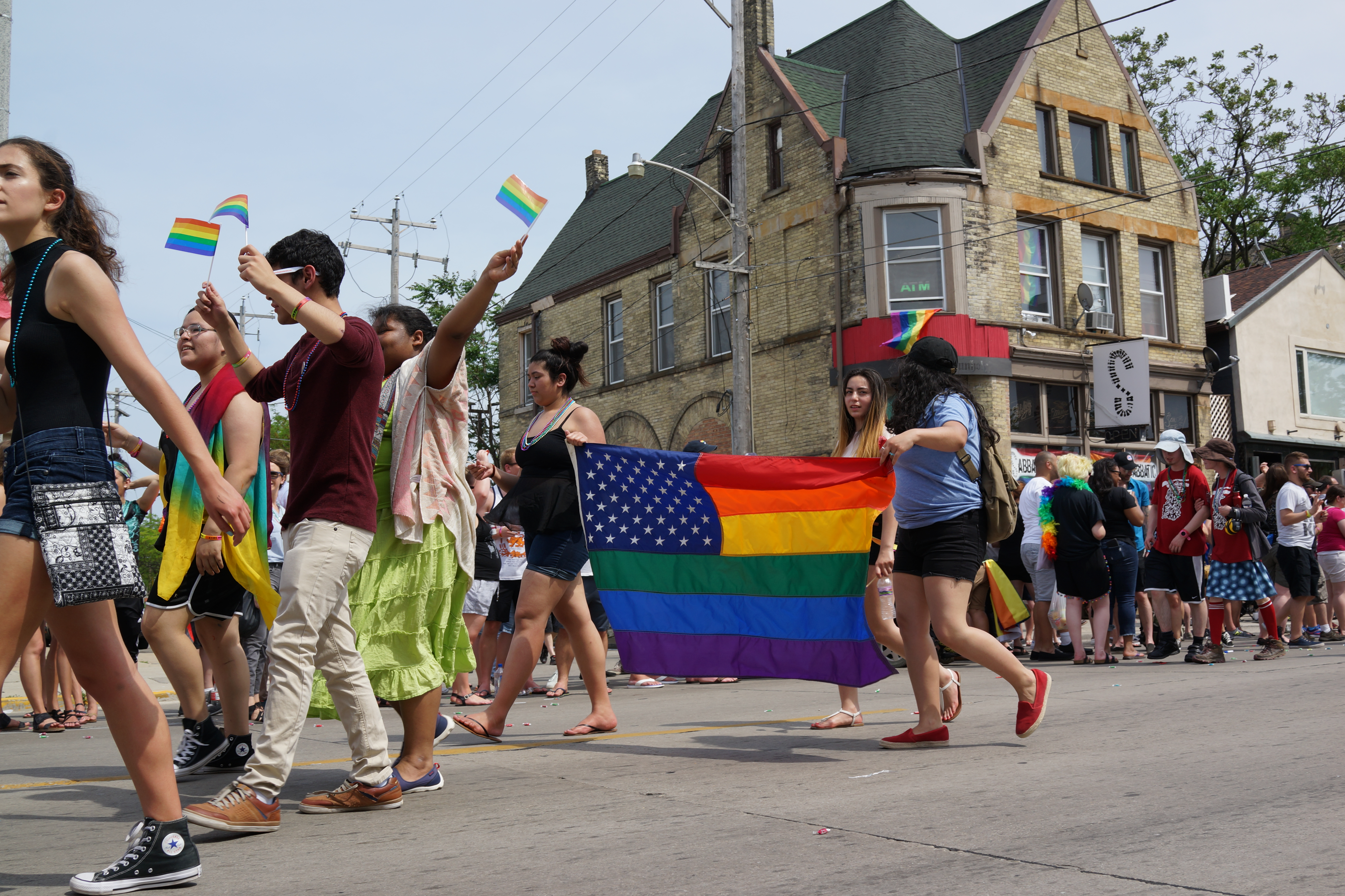 Milwaukee Pride Parade 2017